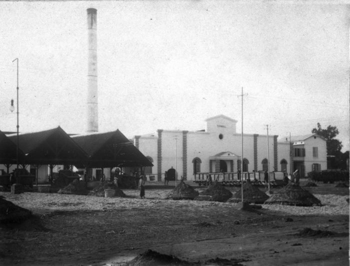 Foto. Suikerfabriek Tjomal, Midden-Java